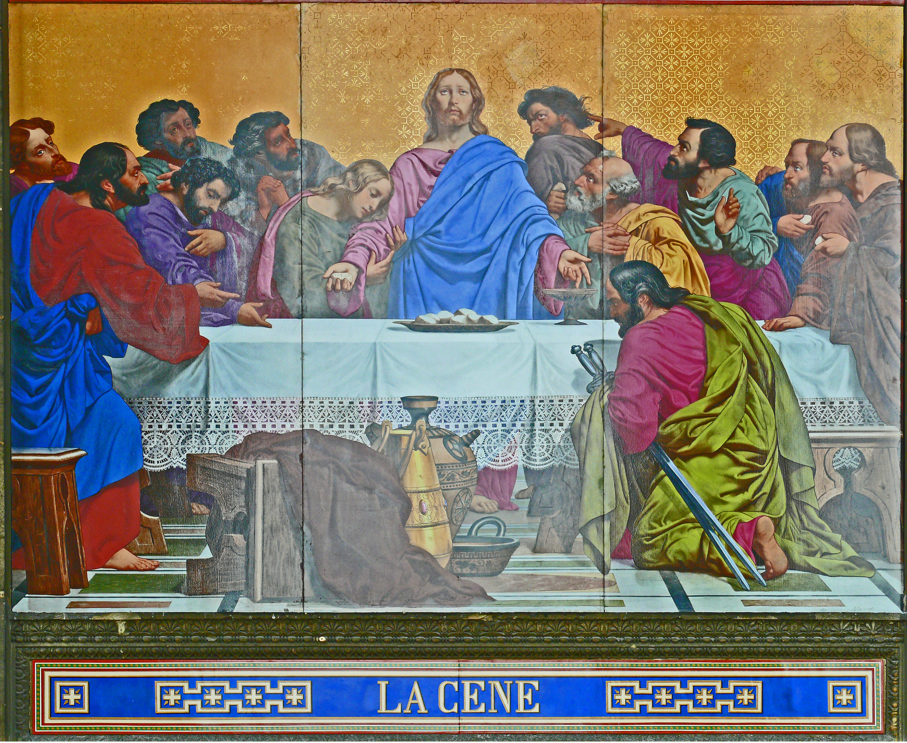 Paris - Église Saint-Vincent-de-Paul - Décor de la façade en plaques émaillées - La Cène